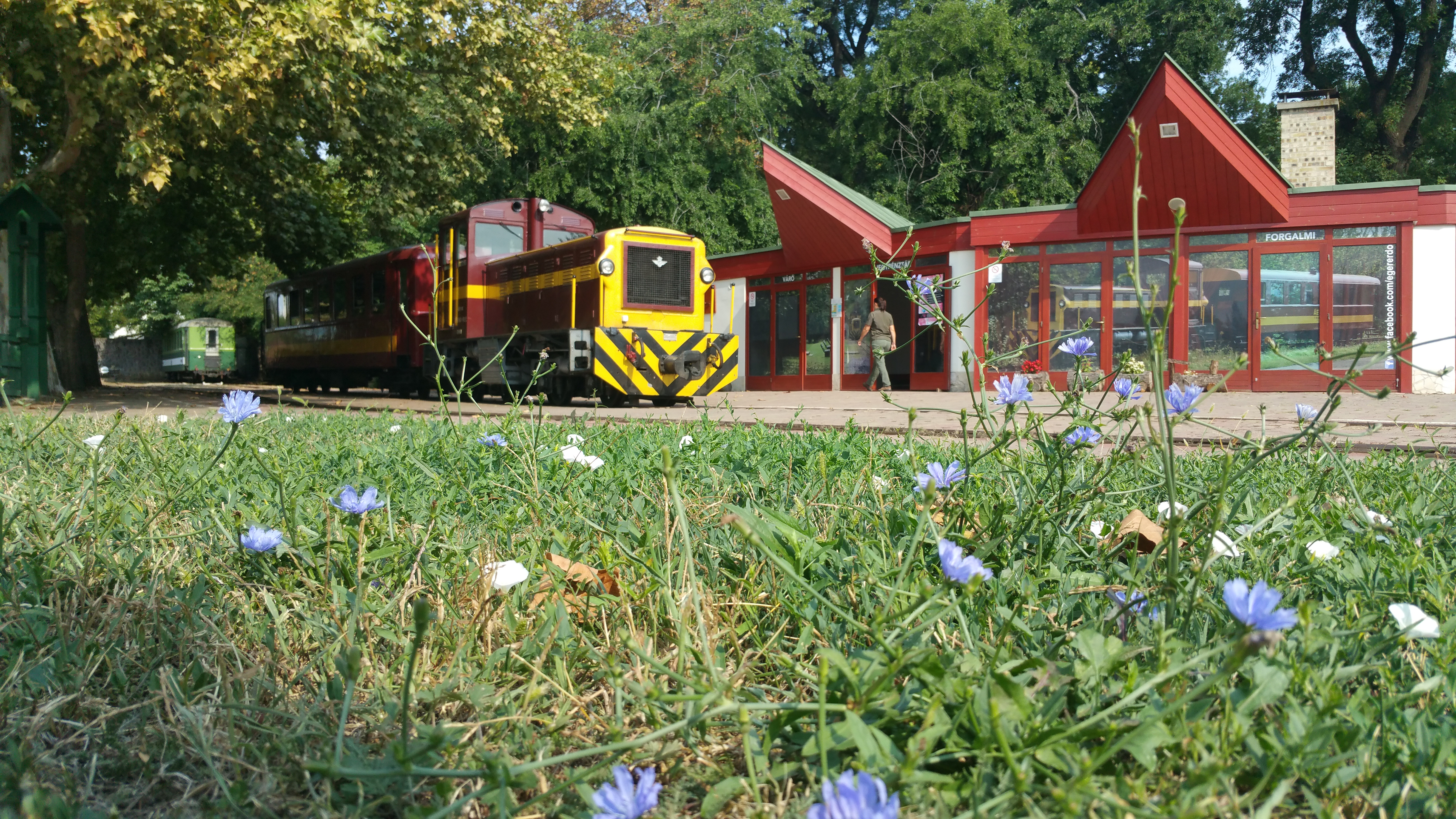 A Mátravasút Gyöngyösi végállomása.